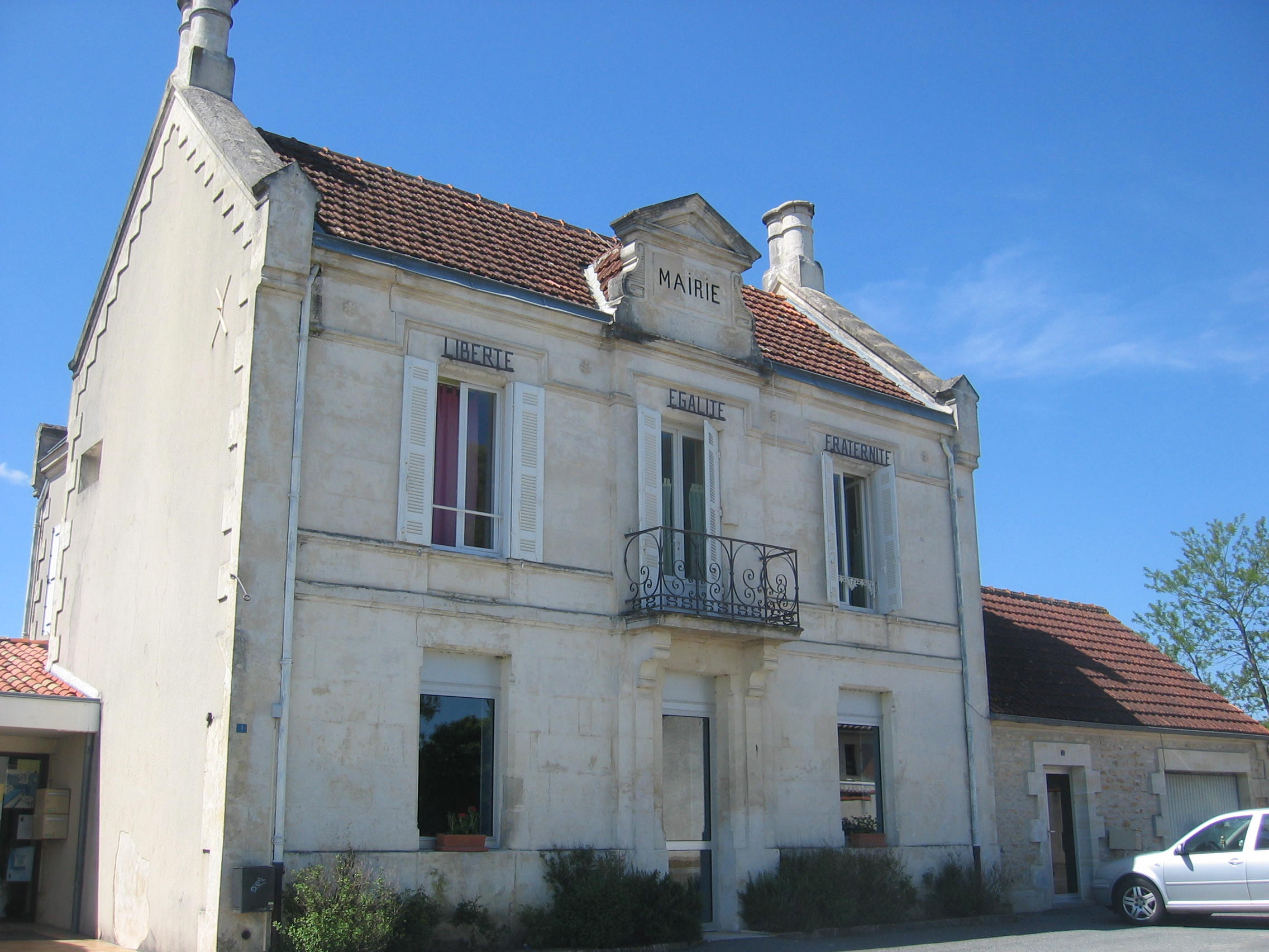 Mairie de Migron en Charente-Maritime.